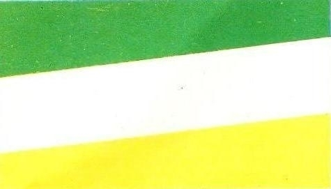 Bandera del distrito de Suyo